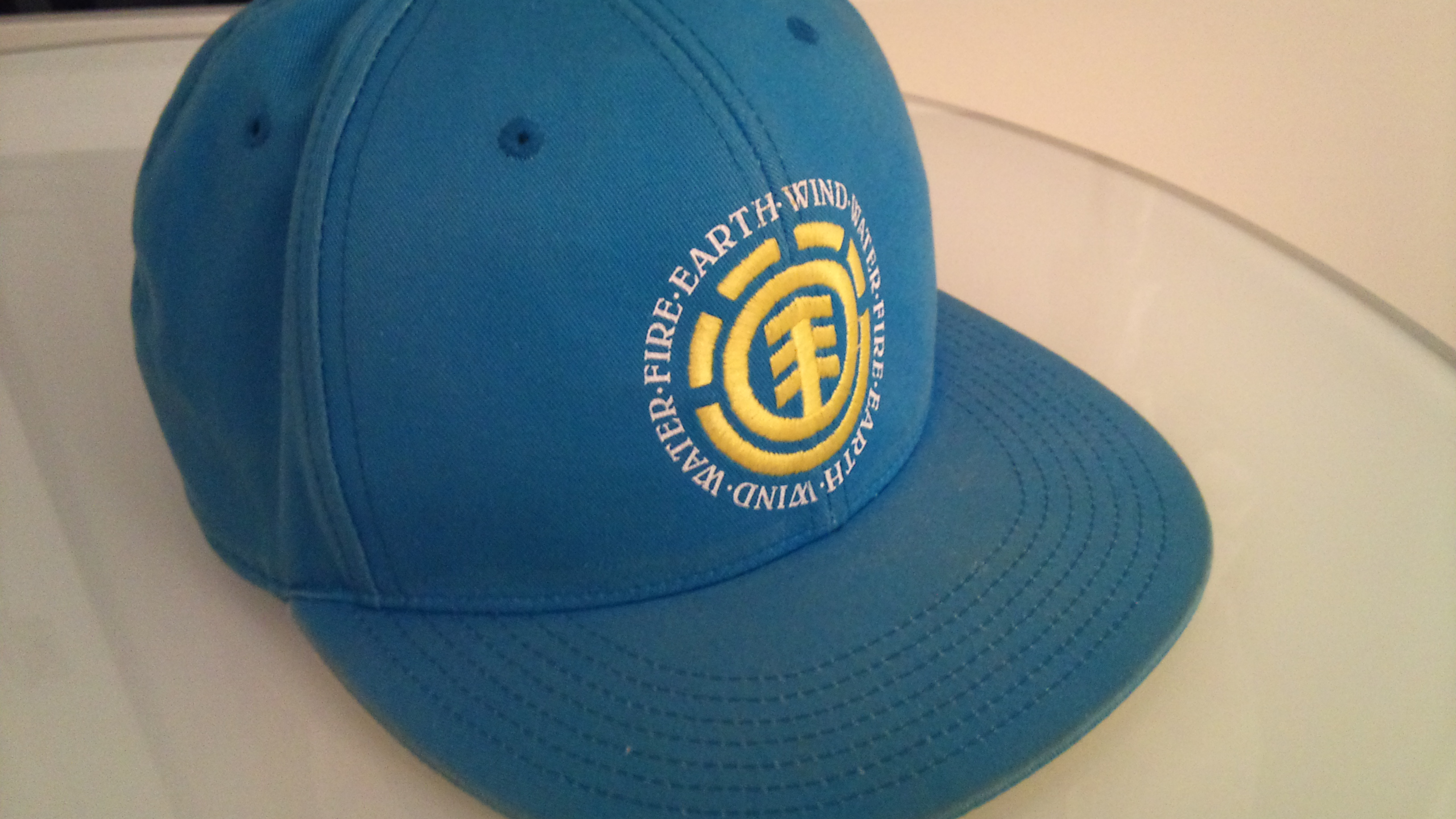 Eine türkise Element-Cap.